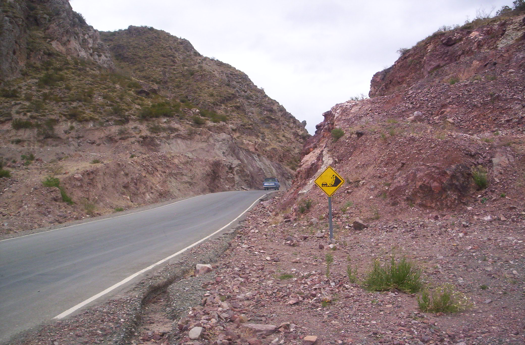 Vista de la Ruta Nacional 153, cerca de Pedernal, departamento Sarmiento, provincia de San Juan Argentina